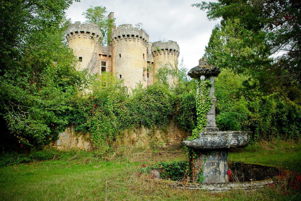 _IGP8966